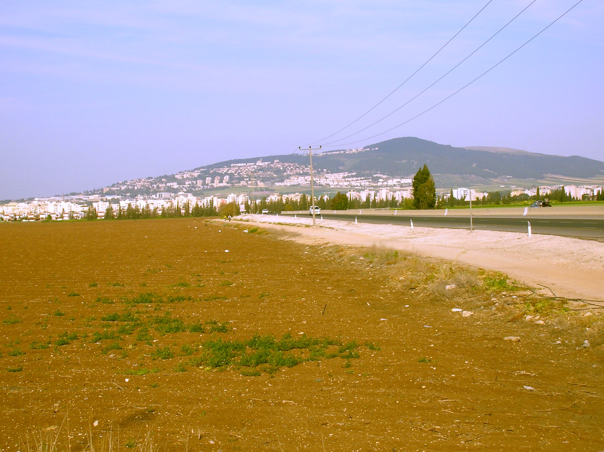 עפולה וגבעת המורה, מבט מדרום מערב, 2006, צולם על ידי מעלה התמונה.